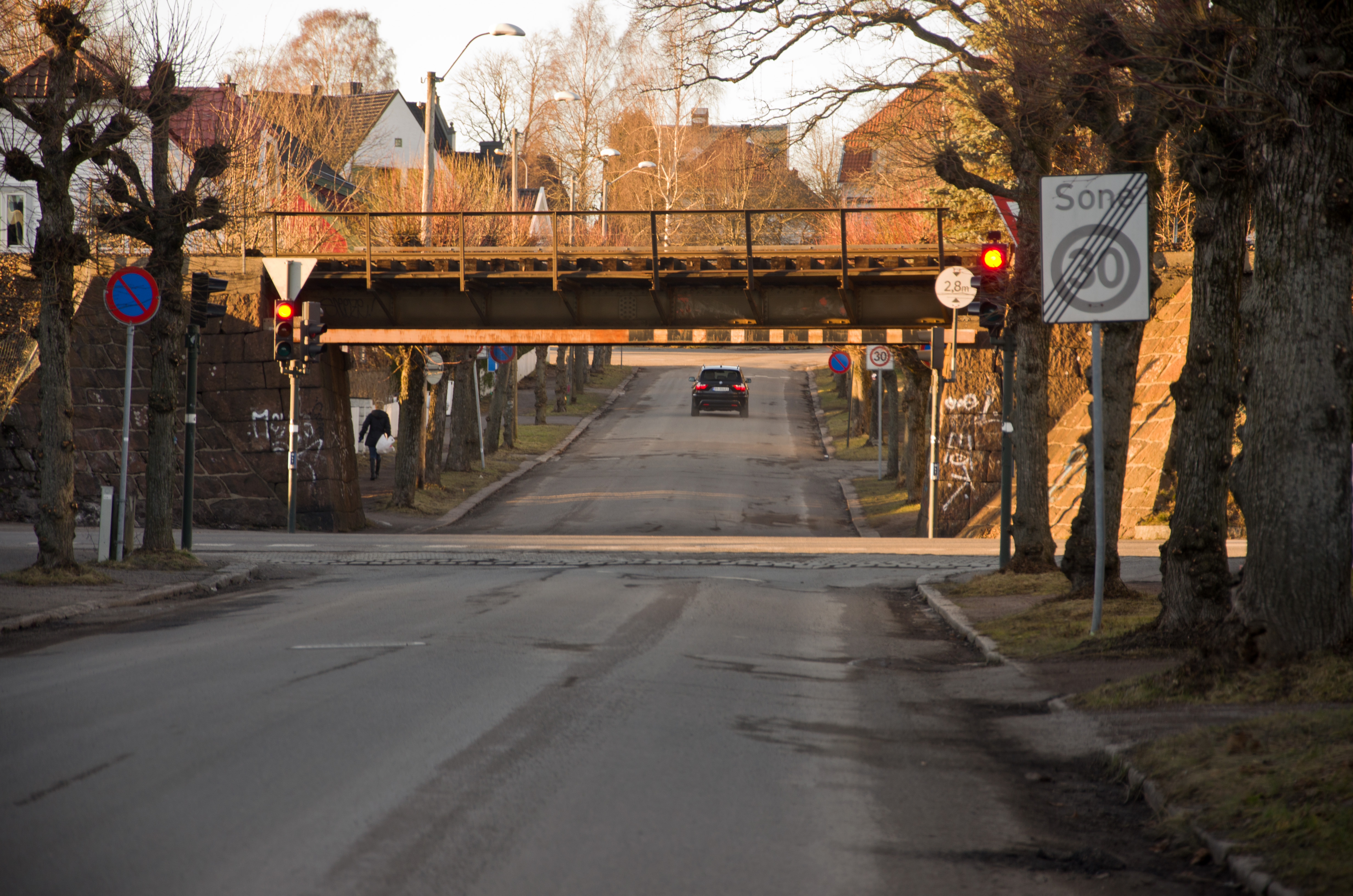 Kaptein Hoffs allé i Tønsberg